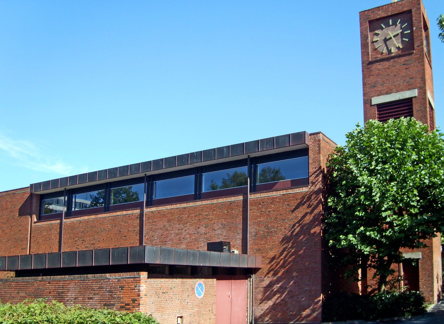 fra nordvest